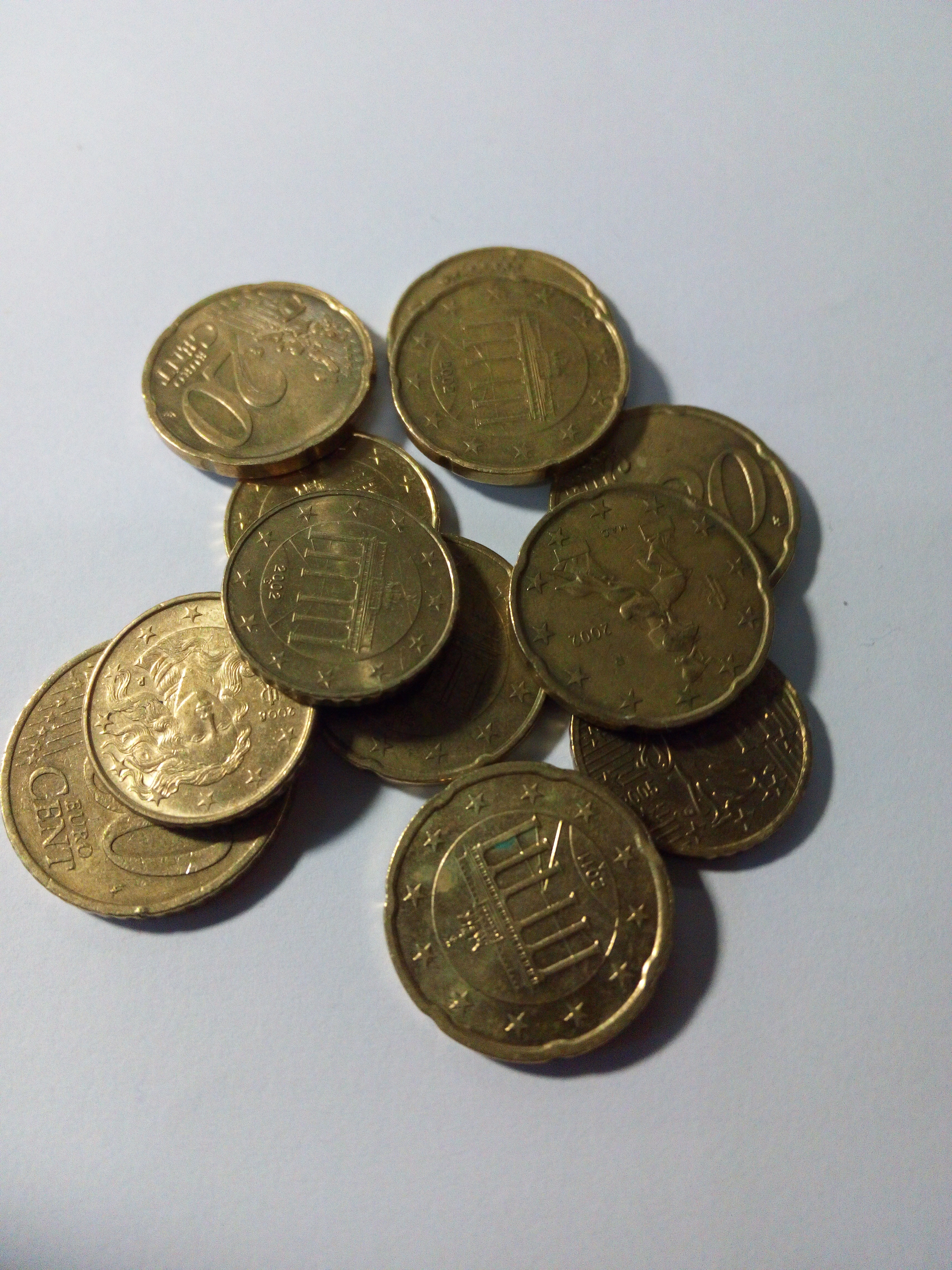 Ein kleiner Haufen von Euromünzen.